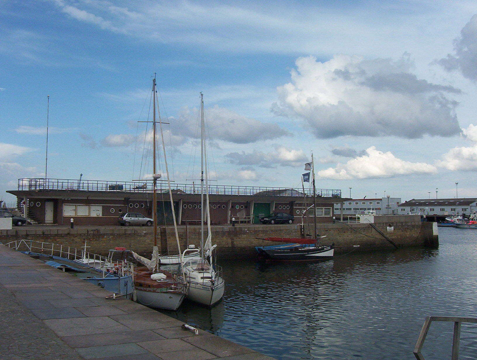 Cherbourg, France : Ancienne Criée de Cherbourg.